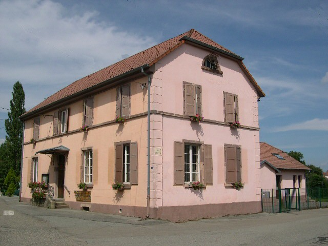 Village d'Eguenigue (Territoire de Belfort), la mairie Photo prise par LP90 en juillet 2004 Copyright : Licence GFDL LP90 juillet 2004